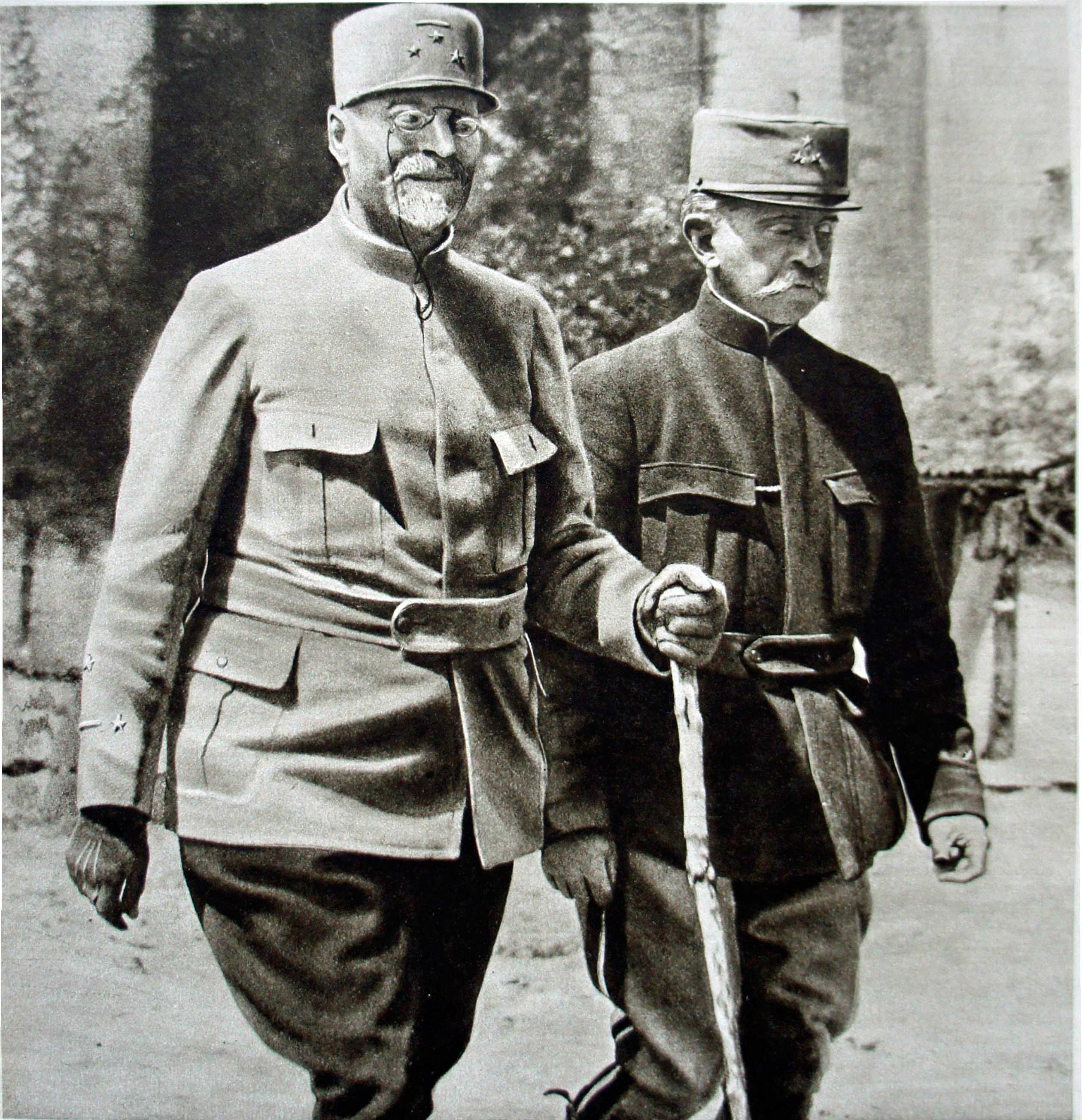 Le Miroir_N°98_Micheler_et_Marchand_octobre_1915.